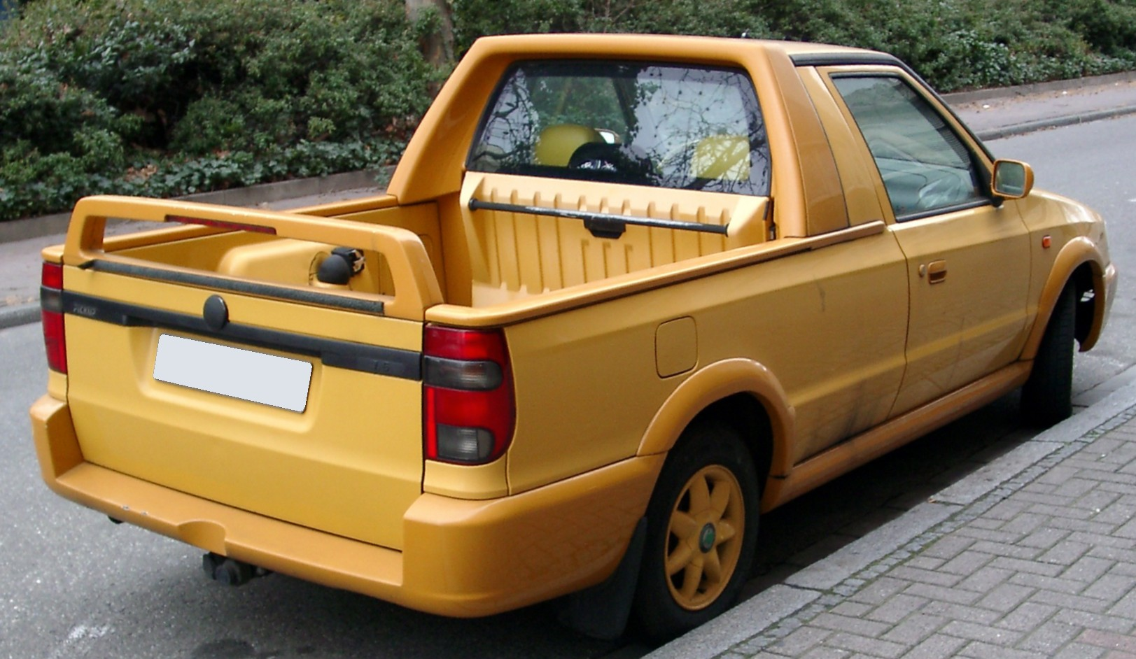 Škoda Felicia Pickup